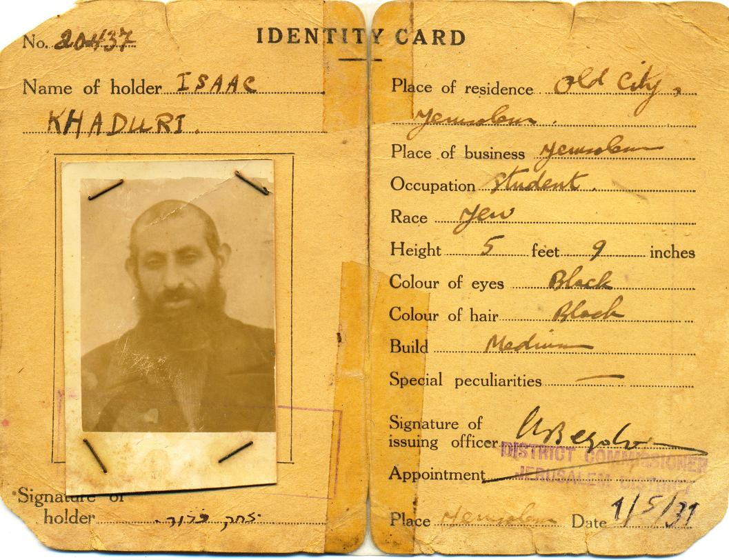 הרב כדורי בצעירותו